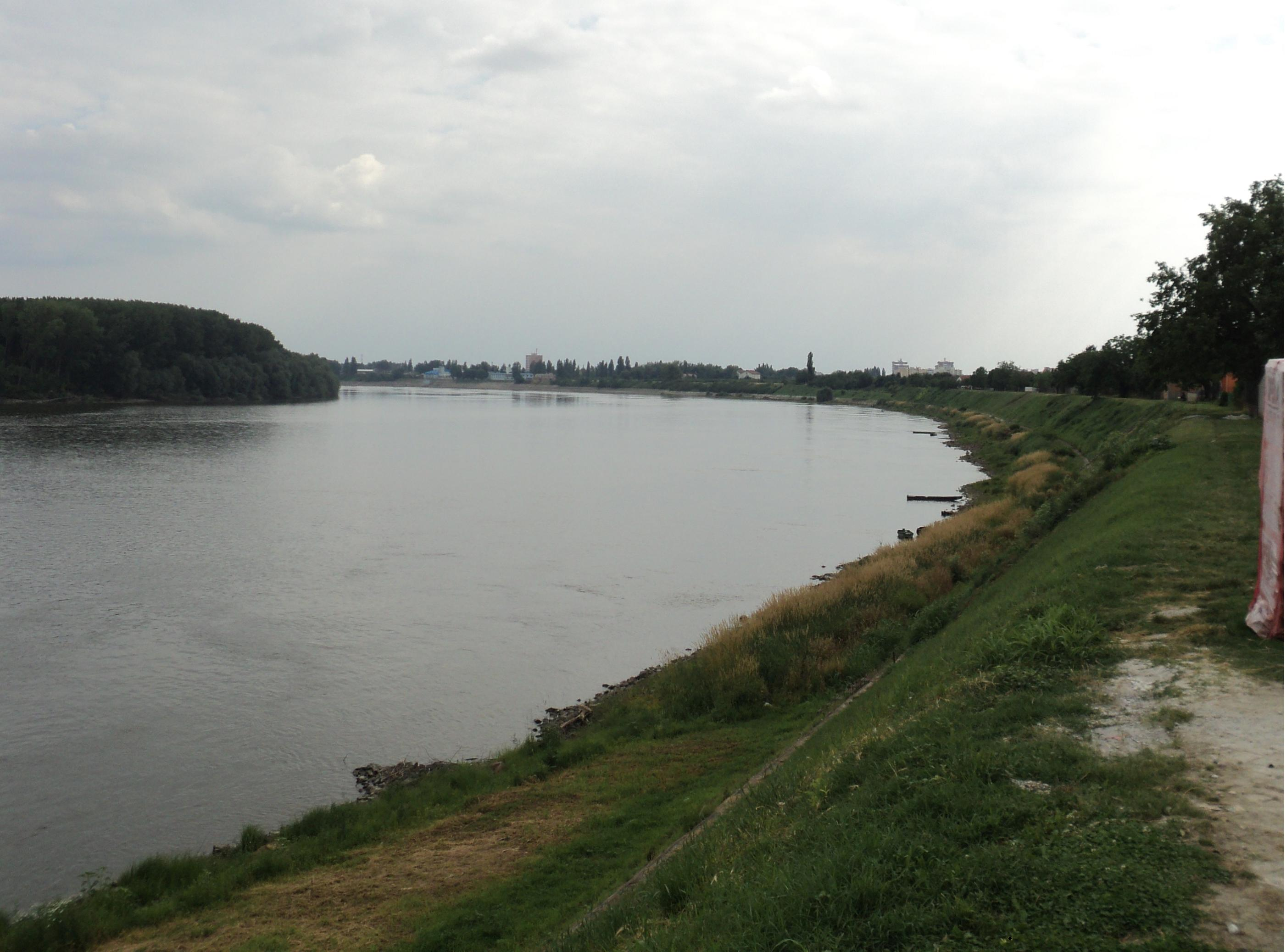 Rijeka Dunav u Borovu selu